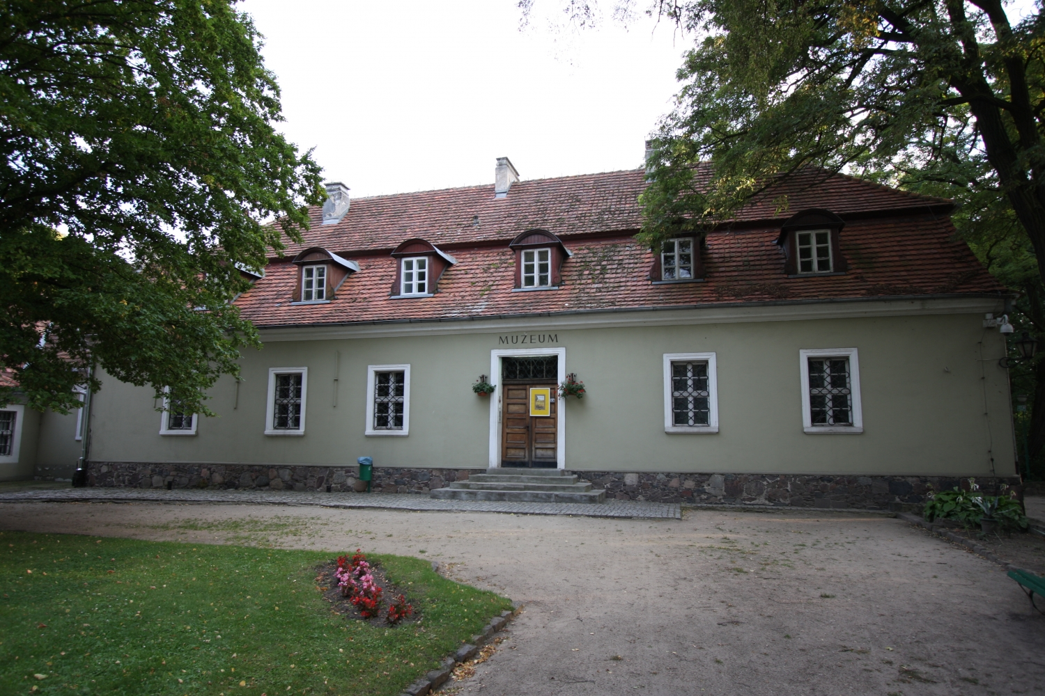 Międzyrzecz, starostwo, w zespole zamkowym, mur., 1719 (zabytek nr 2136 z 8.05.1971; 256 z 04.06.1979)